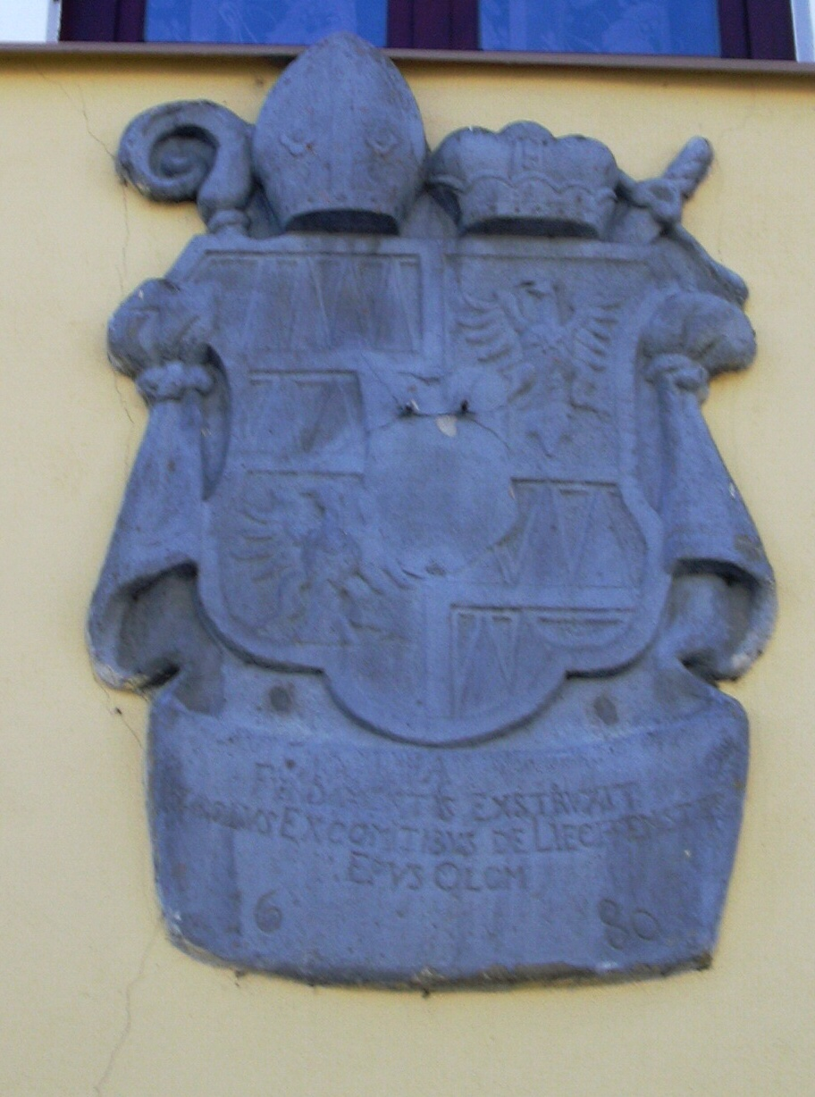 Znak Biskupa Karla z Lichtenštejna na pivovaře (Vyškov - Czech republic)